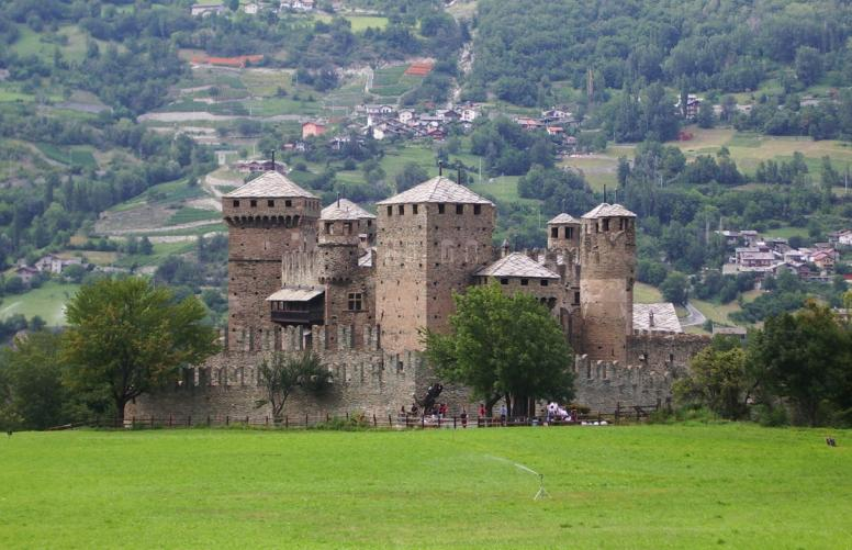 Castello di Fenis, Val d'Aosta. Autore: Bottel Jacques Data: 08/2008